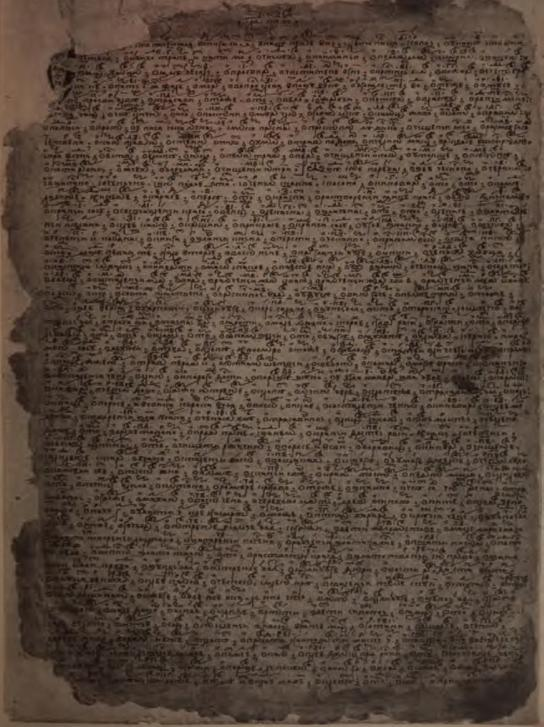 РГБ, шифр Q.XVII.67, лист 2 (оборот). Указ о трапезѣ, иже на Тихвинѣ въ Лаврѣ